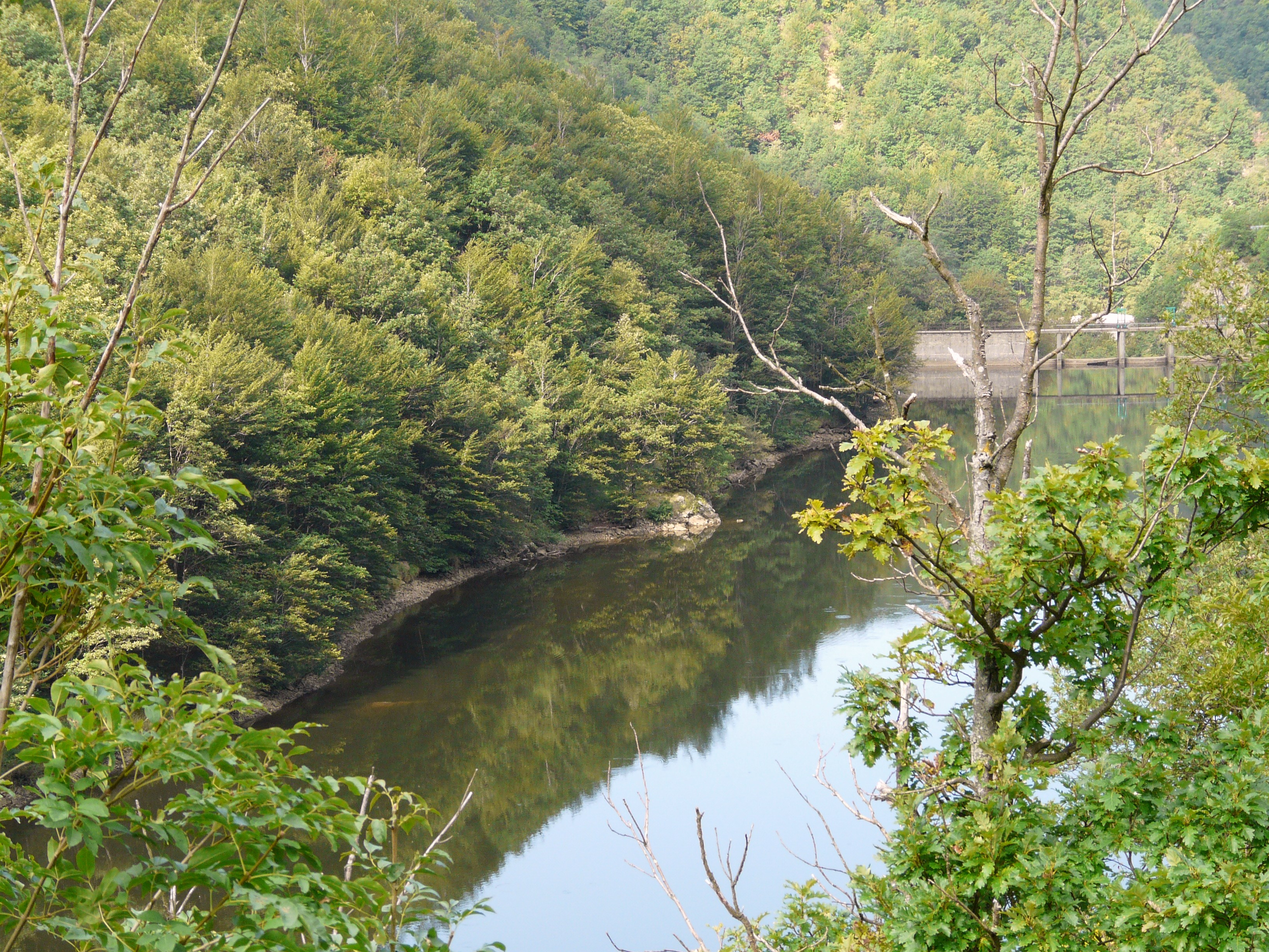 Torrente Orba presso Urbe, Liguria, Italia